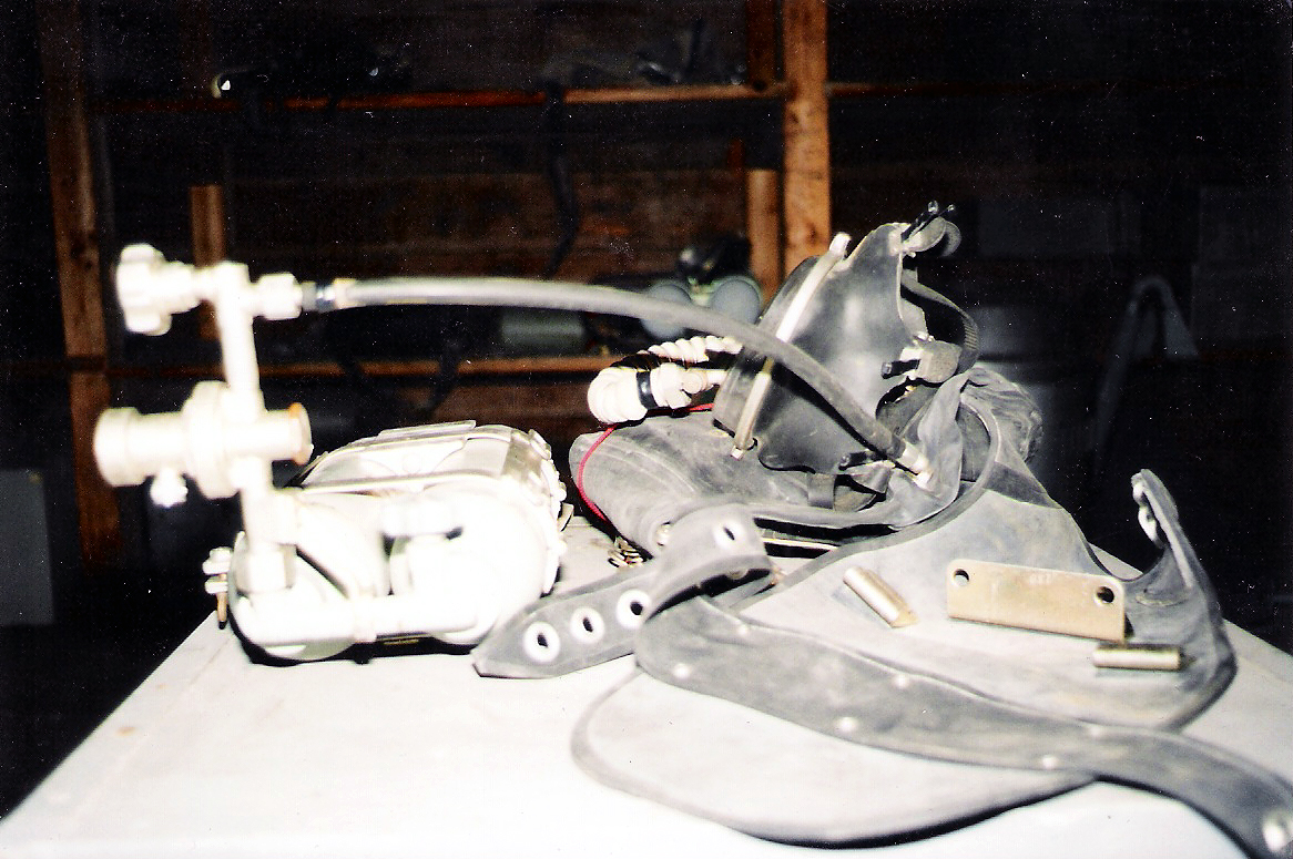 Vakiovirtaustyyppinen SiebeGorman -happisukelluslaite, Sotamuseon kokoelmat